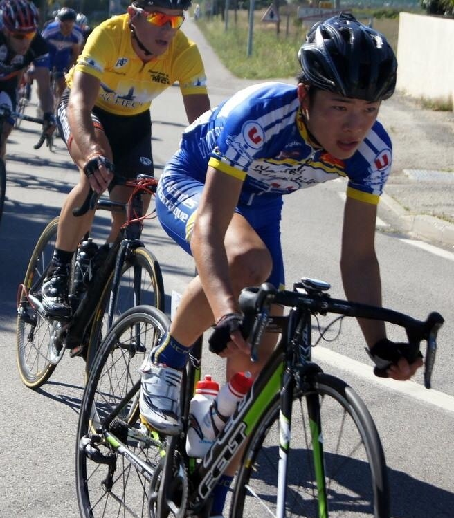 yuri-kobashi